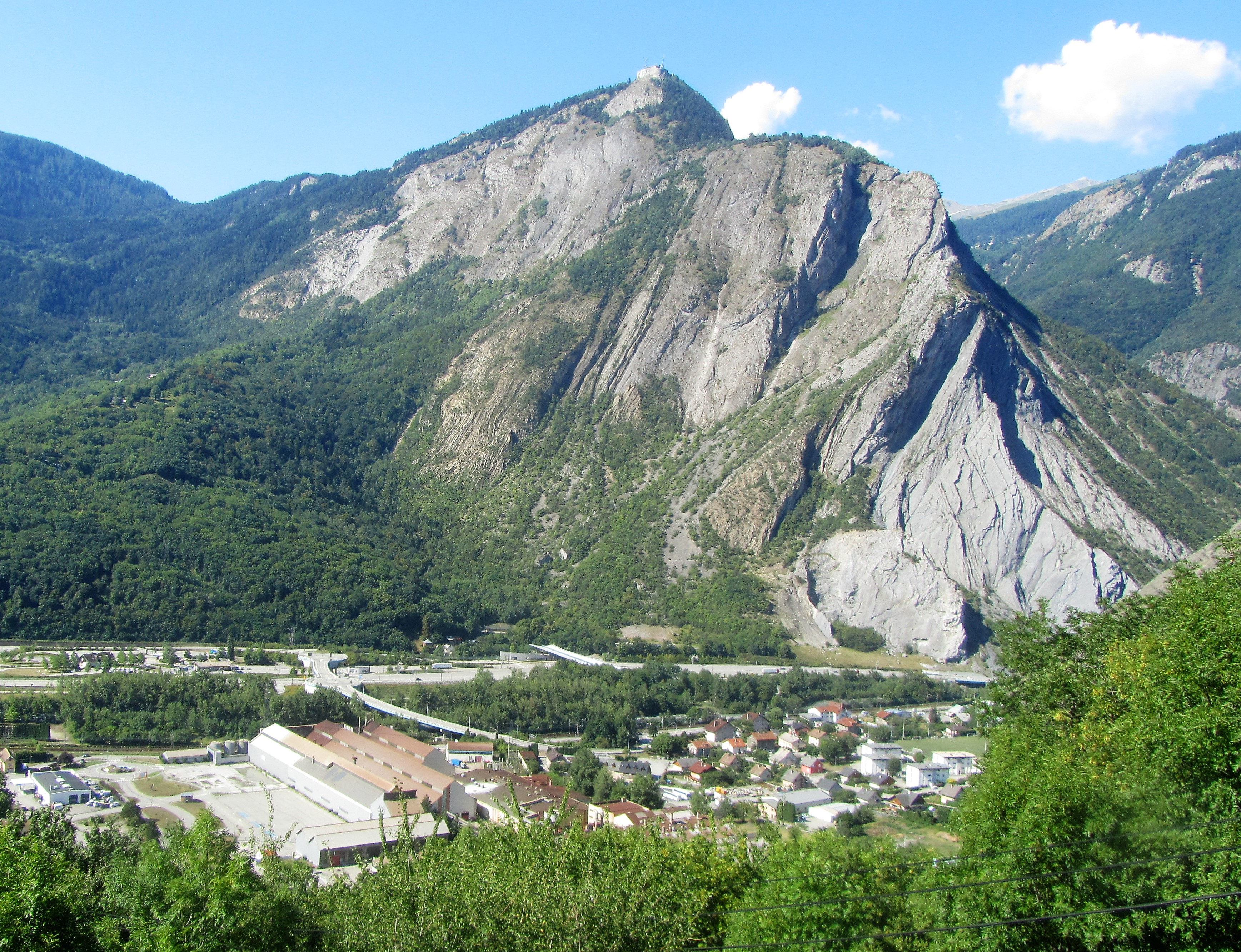 Vestiges des anciens halls des Aciéries du Temple, à Saint-Michel-de-Maurienne.